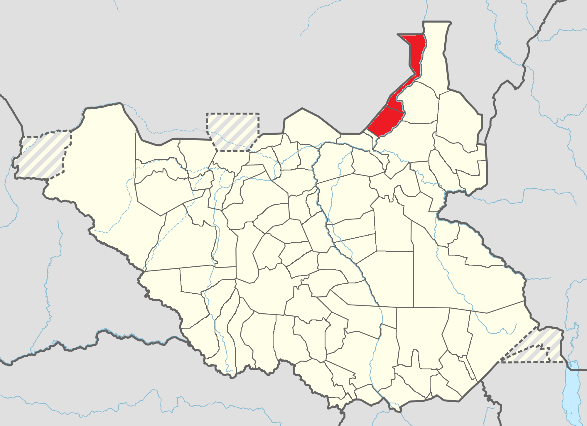 ファショダ州の2郡の地図（2008年郡境）